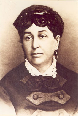 Eldre George Sand, fotografi